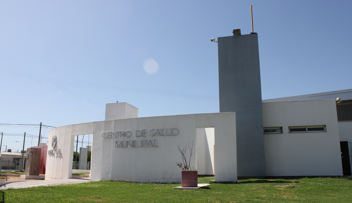 Edificio del Dispensario de Salud Alma Ata de Villa del Rosario construido en parte con fondo donados por la ciudad italiana de Strambino y monumento recordatorio al hermanamiento